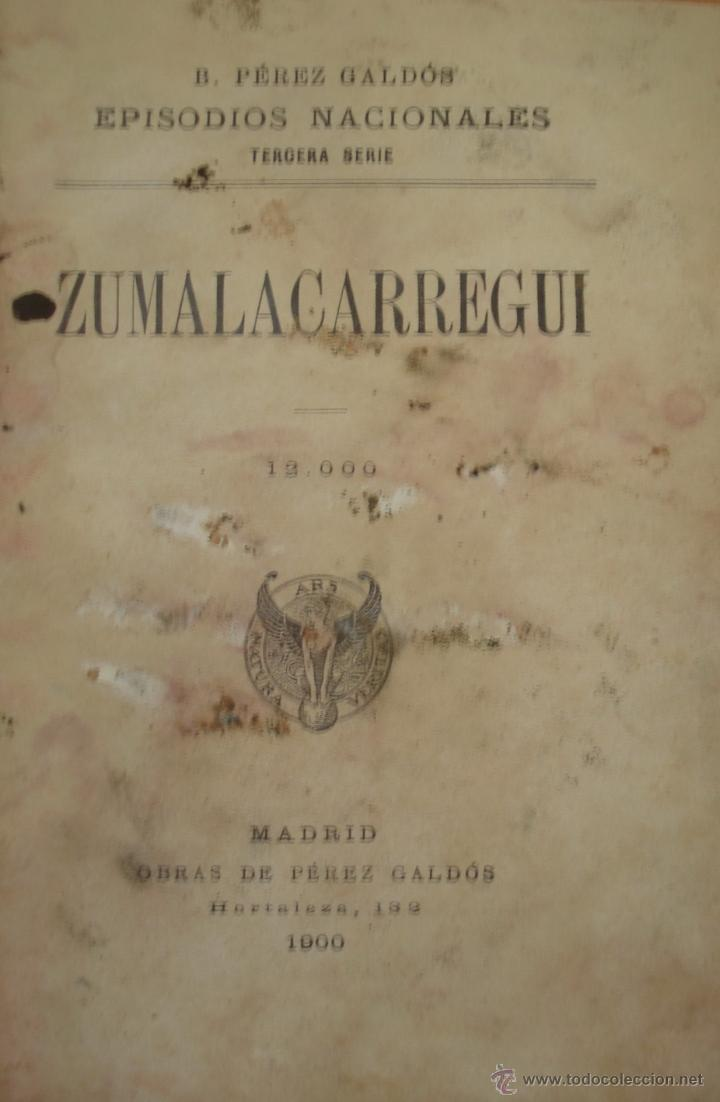 Portada de "Zumalacárregui" de Benito Pérez Galdós, edición de 1900.